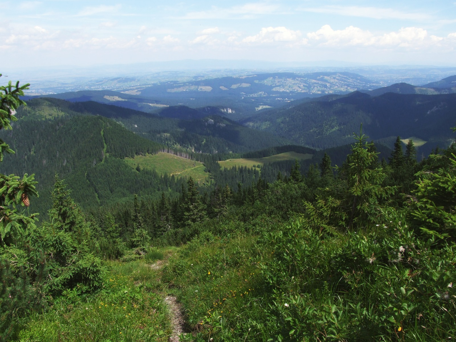 Widok z Bobrowca na Polanę Jaworzyna i dolną część Doliny Chochołowskiej